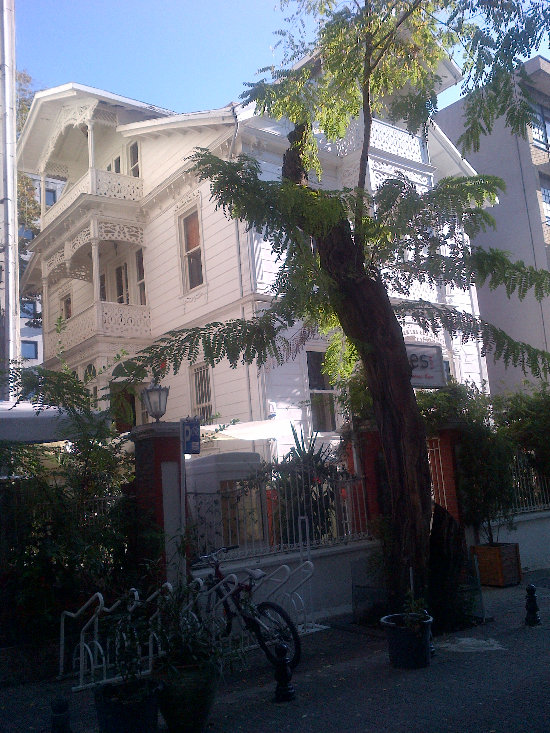 Un antiguo "konak" (casona) de madera en el barrio de Bahariye en Kadıköy.